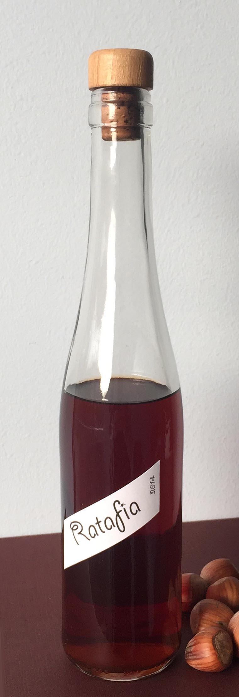 Ampolla de ratafia casolana